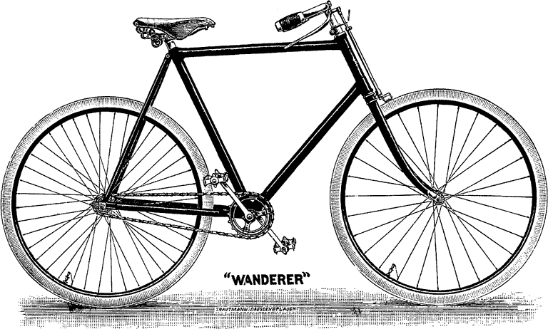 Motiv: Straßenrennmaschine der Firma Wanderer. Scan: KMJ (Agfa StudioScan IIsi) Digitale Bearbeitung: KMJ (Adobe Photoshop) Bildname: Rennrad_01_KMJ.png Bildgröße: 768 Pixel × 462 Pixel (43.673 Bytes) Stichworte: Fahrrad, Rennrad, Straßenrennrad, Straßenrennmaschine, Radfahrsport, Wanderer, Fahrradtechnik; Bemerkungen: —